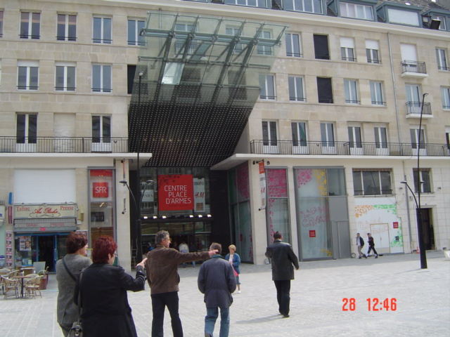 Entrée principale par la place d'armes le 28 avril 2006. (On remarque une vitre cassé certes...)